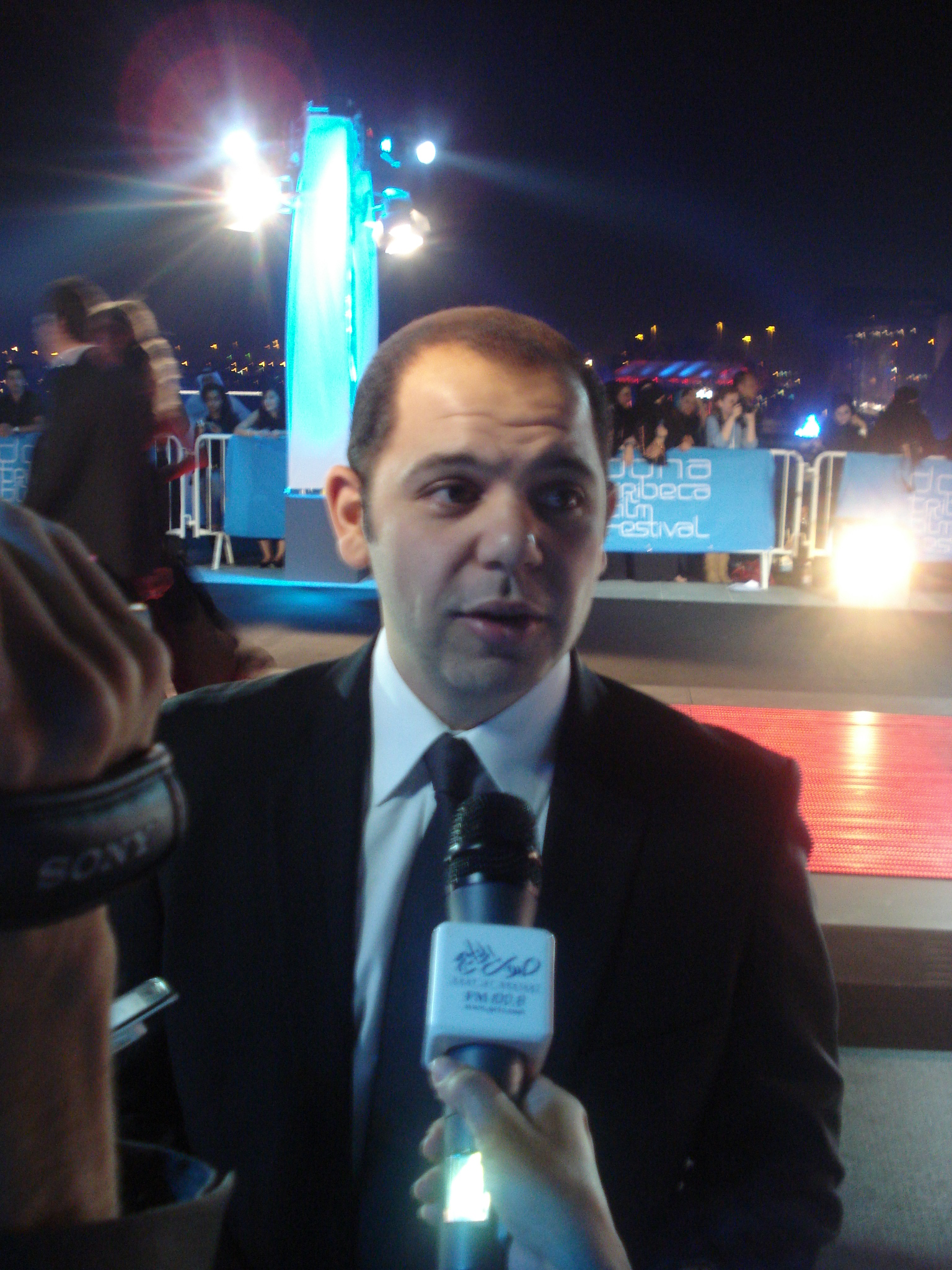 Rami Imam in qatar 2009.